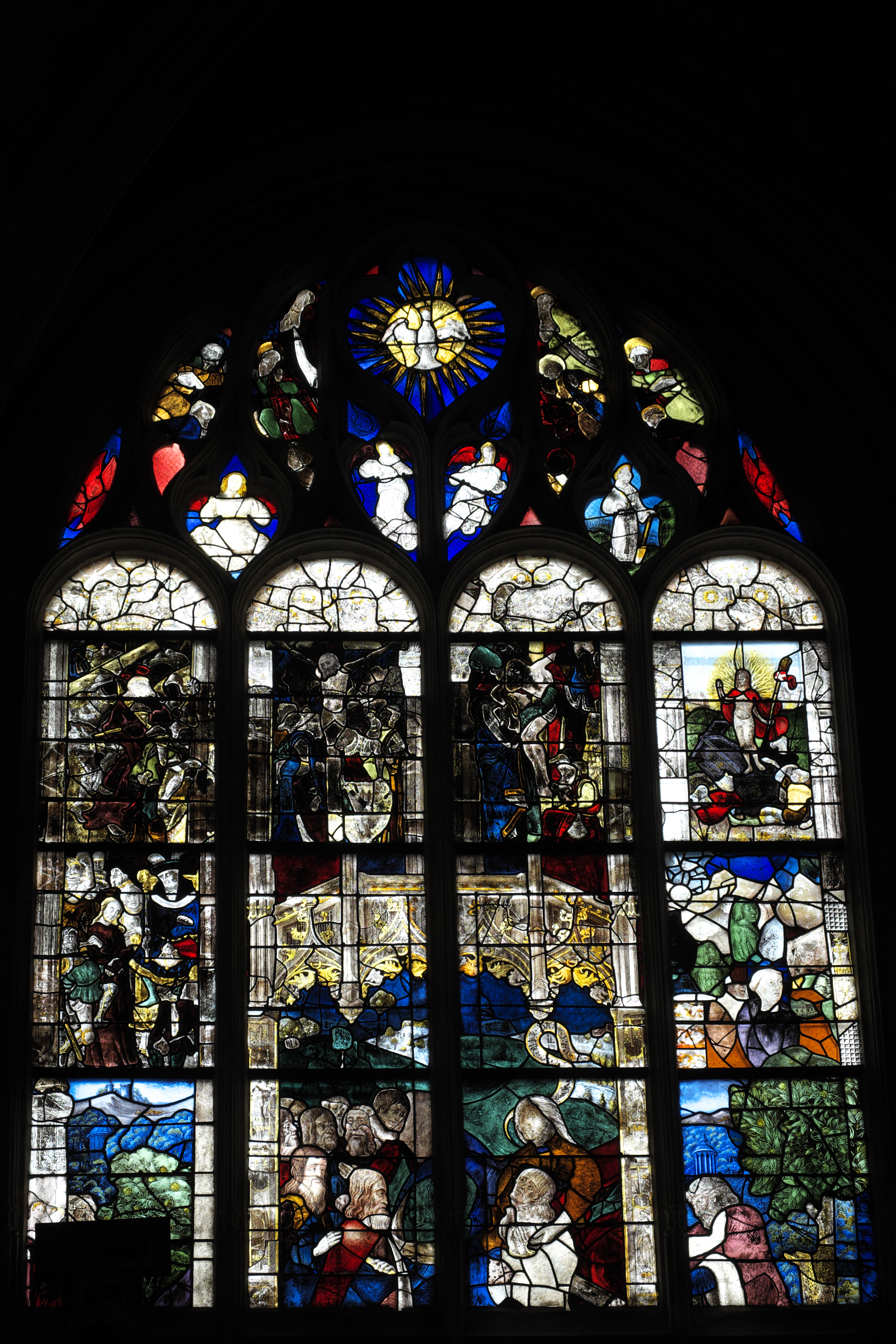 Katholische Pfarrkirche Notre-Dame-des-Marais in La Ferté-Bernard im Département Sarthe (Pays de la Loire/Frankreich), Bleiglasfenster mit Fragmenten aus dem späten 15. Jahrhundert und von Robert Courtois aus der ersten Hälfte des 16. Jahrhunderts, im 19. Jahrhundert zusammengesetzt; Darstellung: Szenen der Passion, Auferweckung des Lazarus